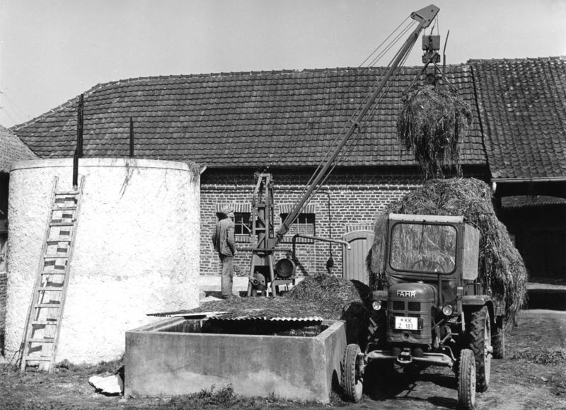 Landwirtschaftliche Aufnahmen in Lobberich bei Viersen am 20.9.1957 – Beim Verladen von Dünger mit einem Kran auf einen Anhänger am Traktor im Bauernhof Information added by Wikimedia users.